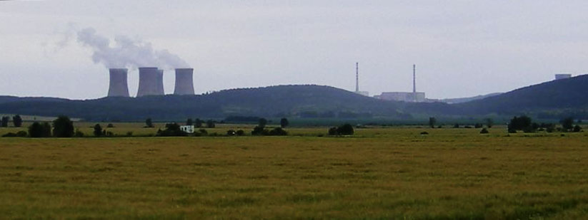 Mochovce